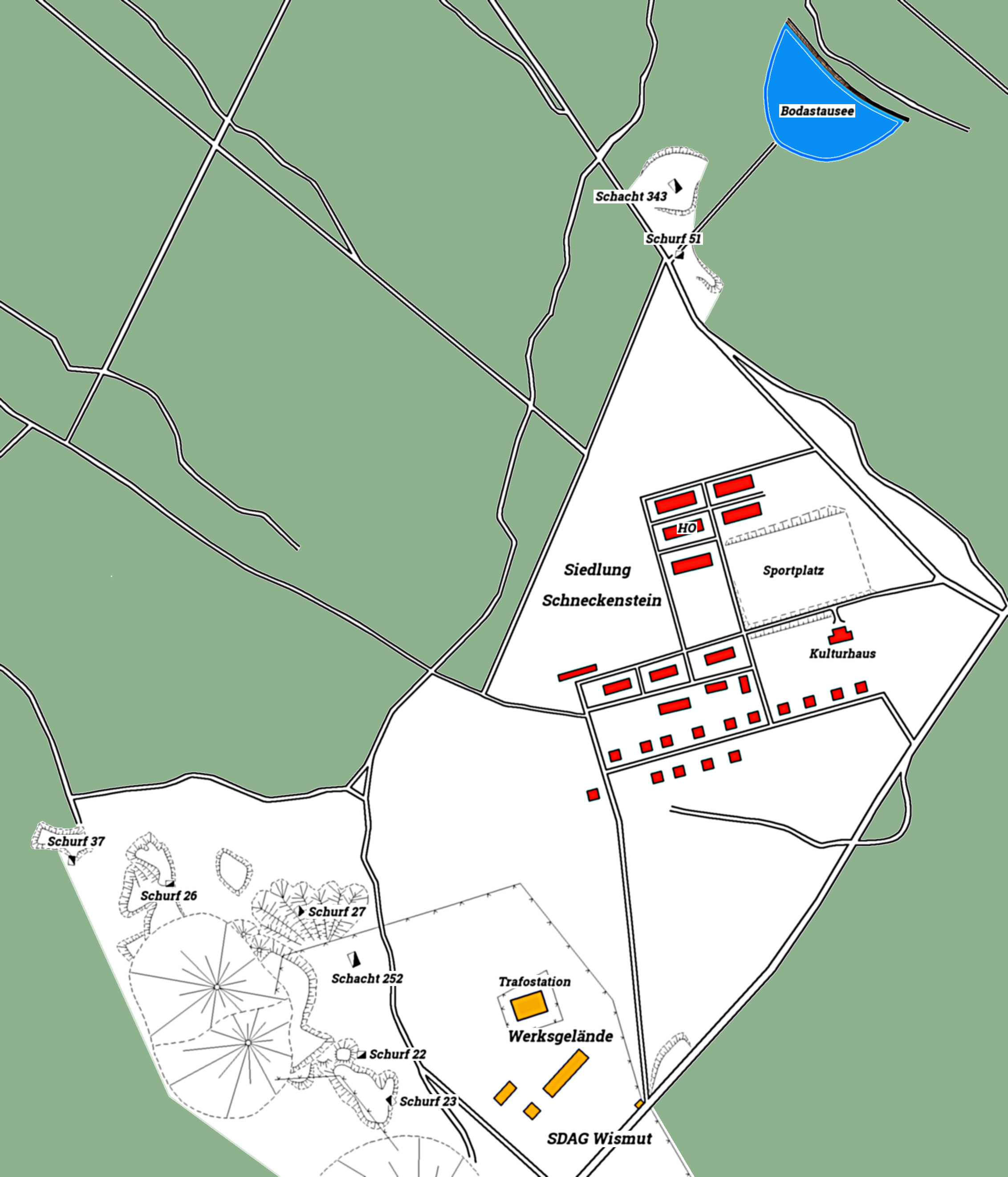 Siedlung Schneckenstein um 1960